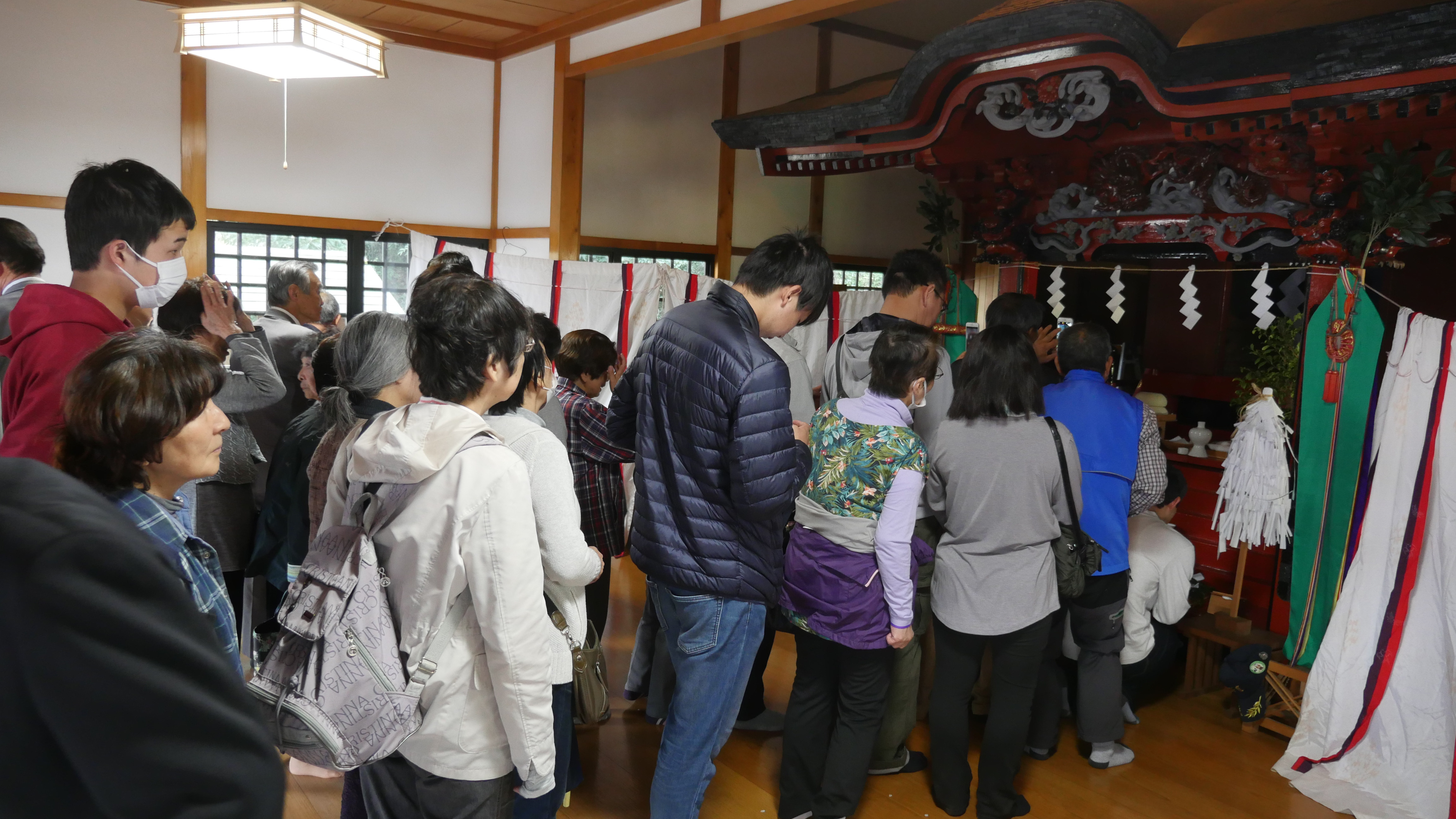 １０年に一度のご開張とあって長い行列ができました。